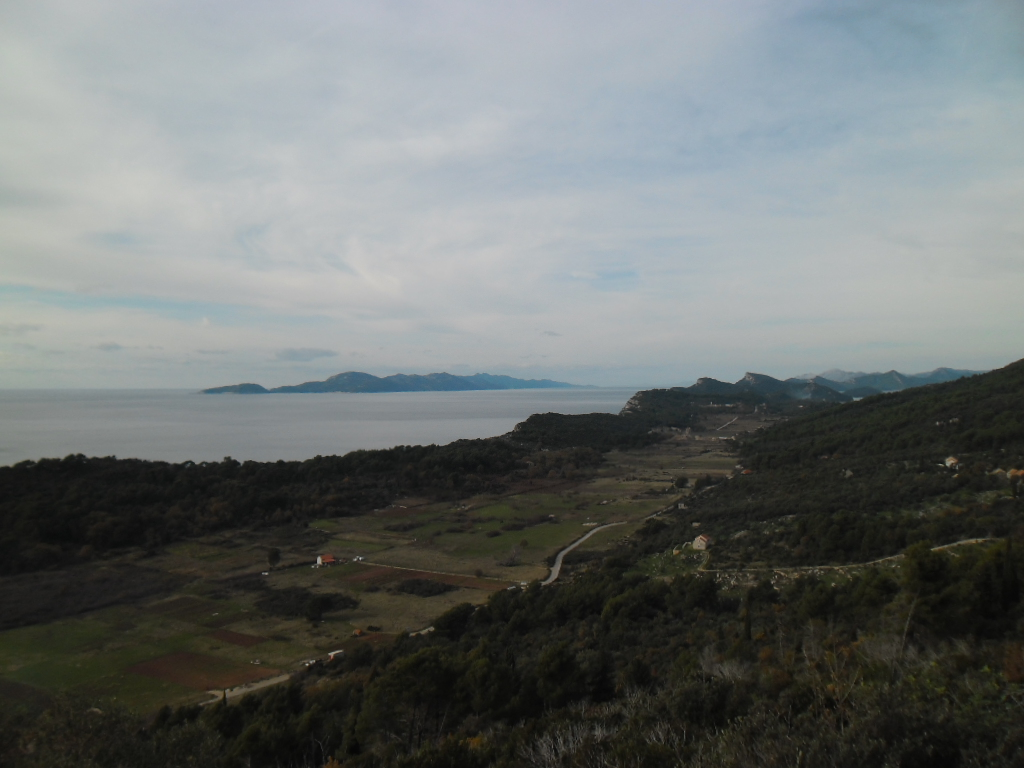 pogled na Šipansko polje s Pakljene